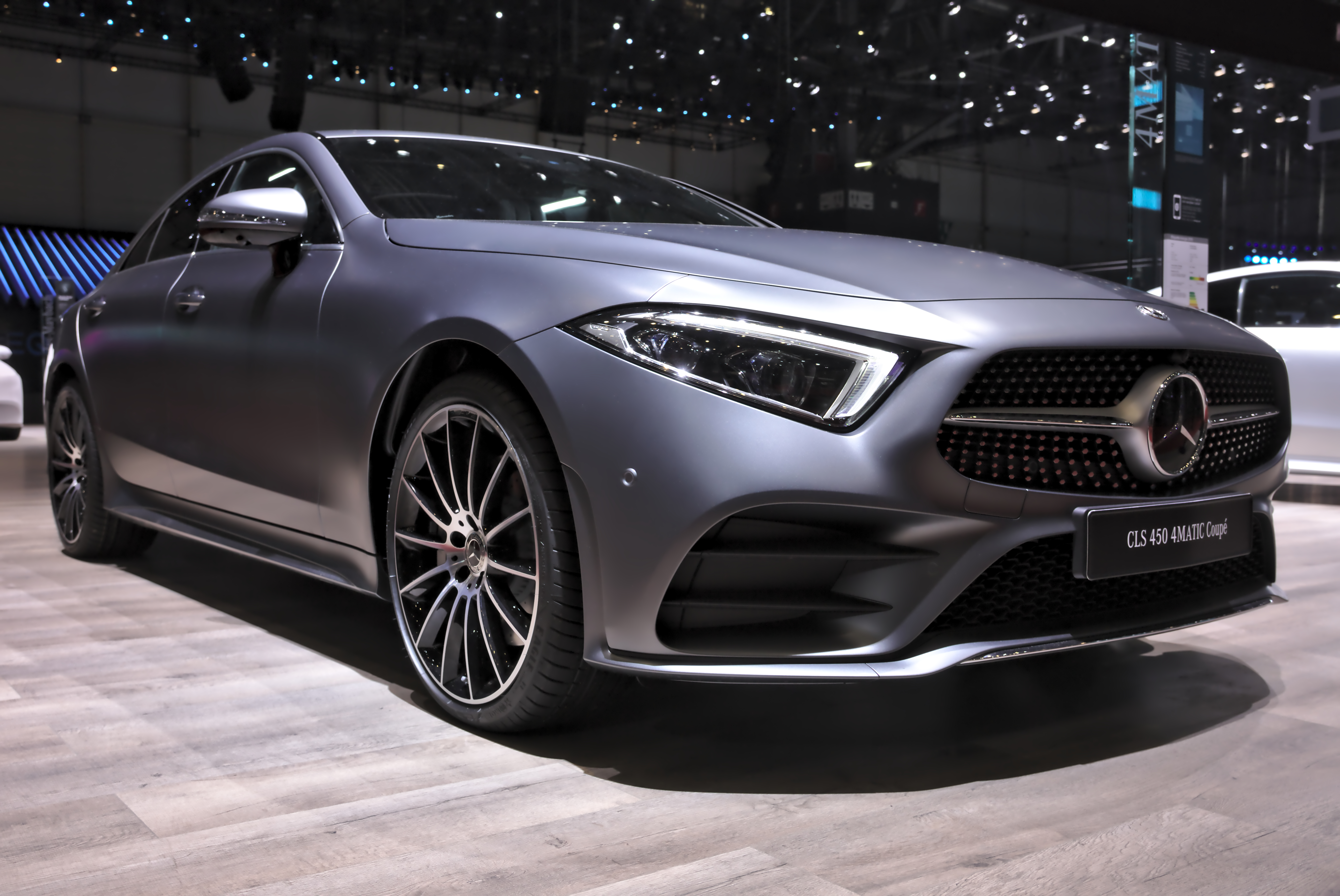 Mercedes-Benz CLS 450 4Matic at Geneva Motorshow 2018